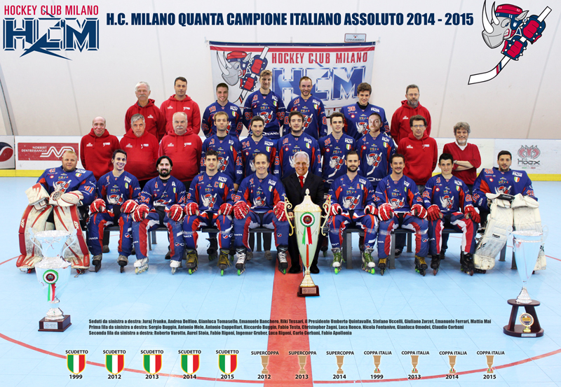 la formazione 2014/2015